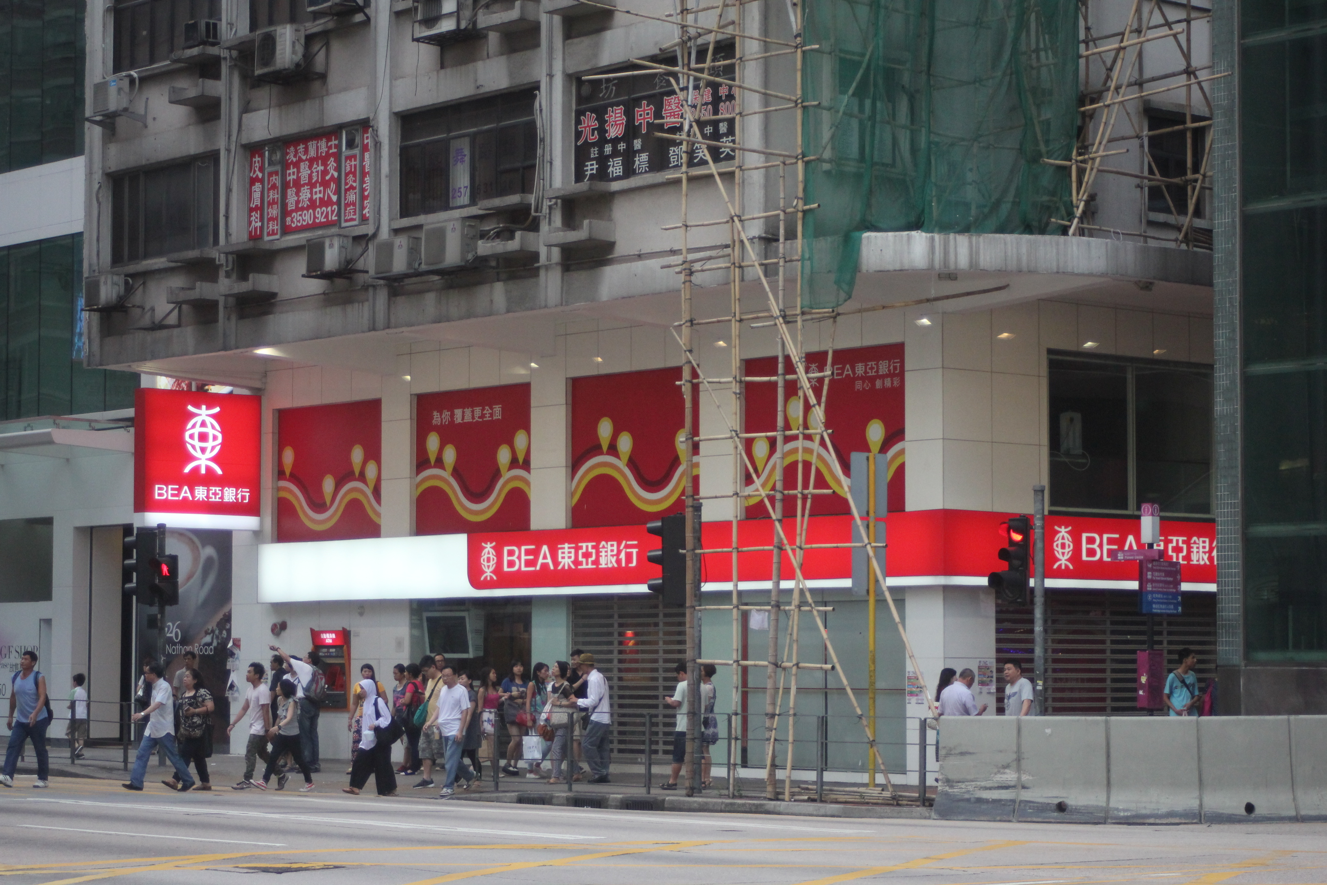 東亞銀行 旺角北分行